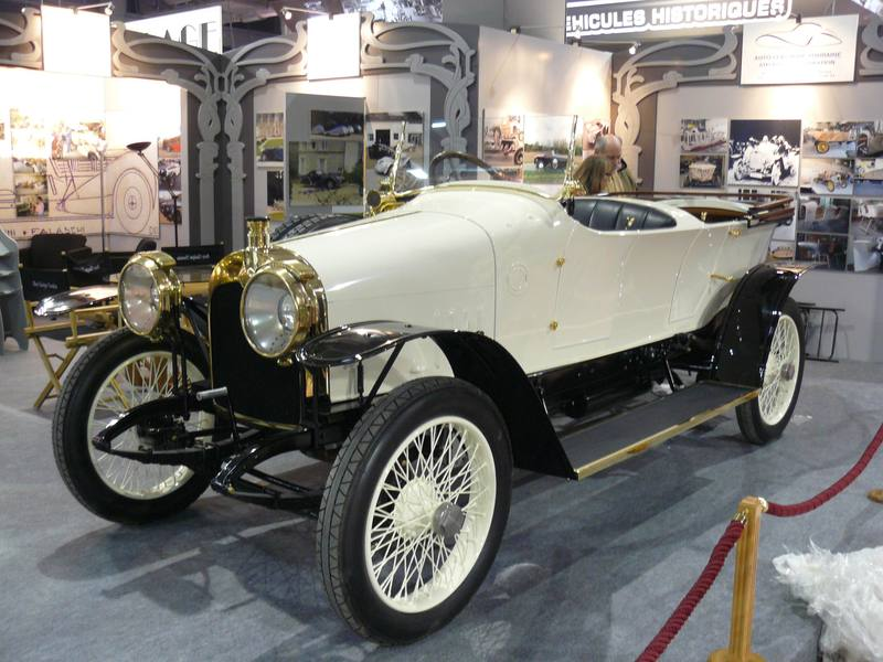 Retromobile 2012